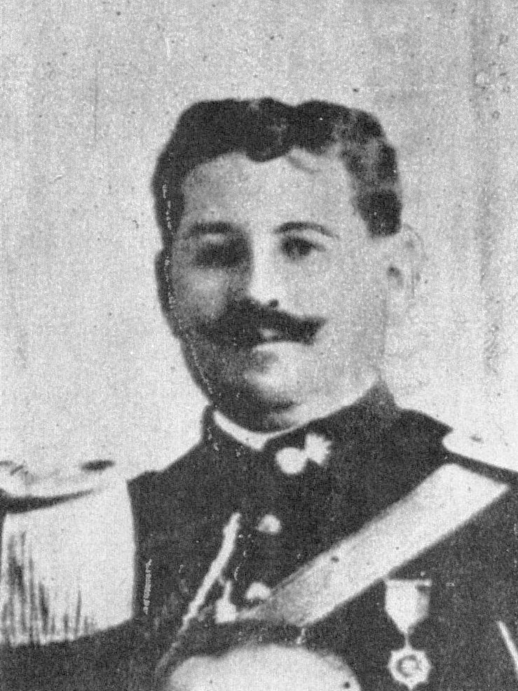 Coronel Gustavo Garmendia